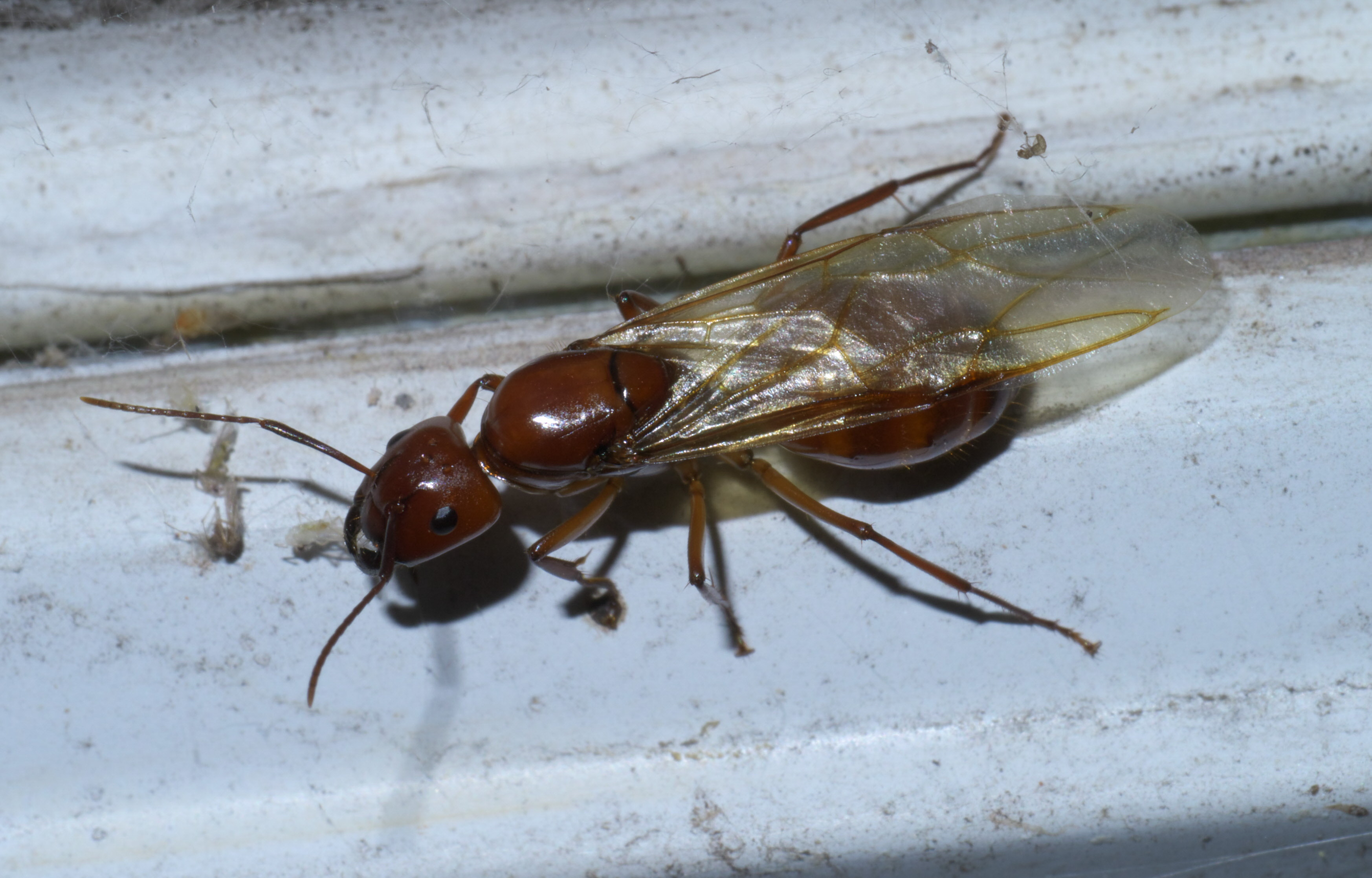 Camponotus castaneus, Genus: Carpenter Ants, ID Confidence: 98